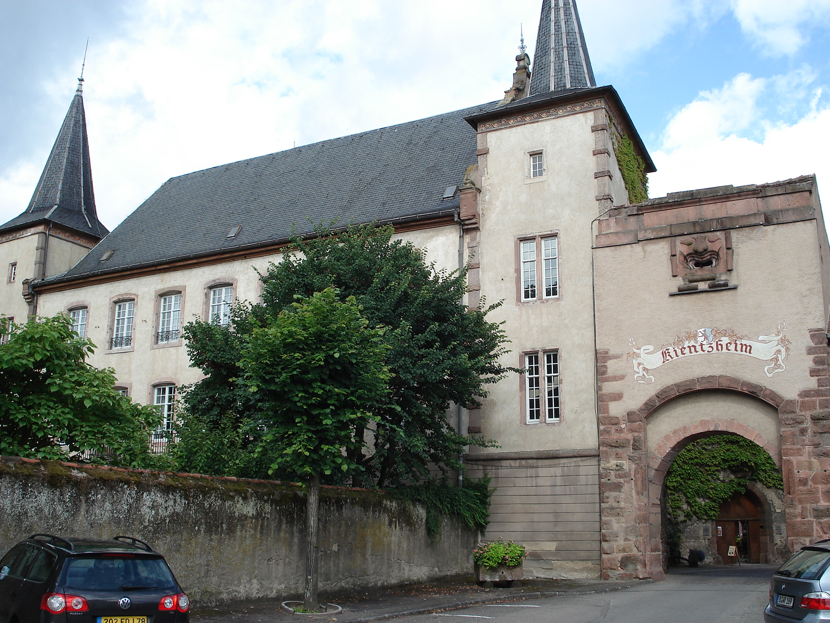 Kientzheim (Haut-Rhin, Alsace, France): château Schwendi, deuxième moitié XIVe siècle, avec à droite la Porte Basse (ou Porte Est, dite aussi Porte du Lalli), construite en 1375 par Ulrich de Ribeaupierre.